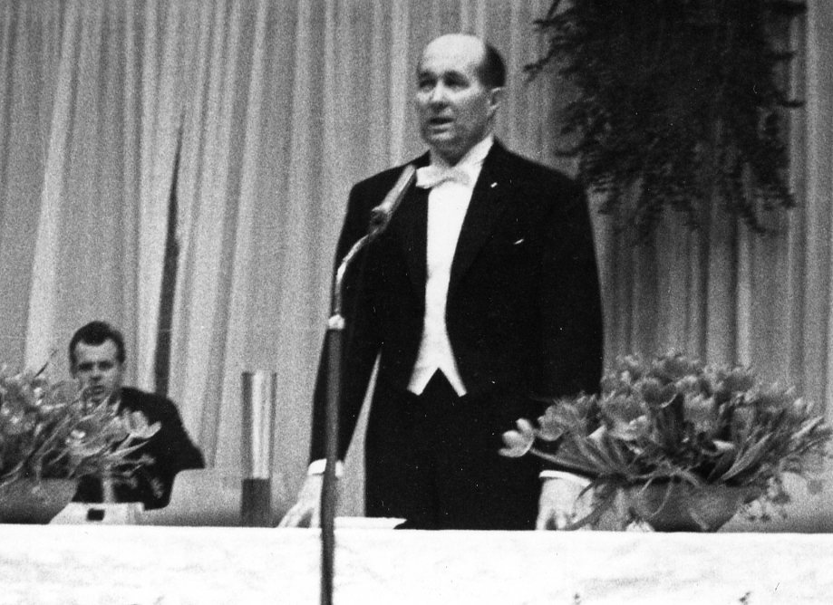 Dr. Werner Dietrich als Leiter des Tanzturniers um den Goldstadtpokal (Pforzheim)